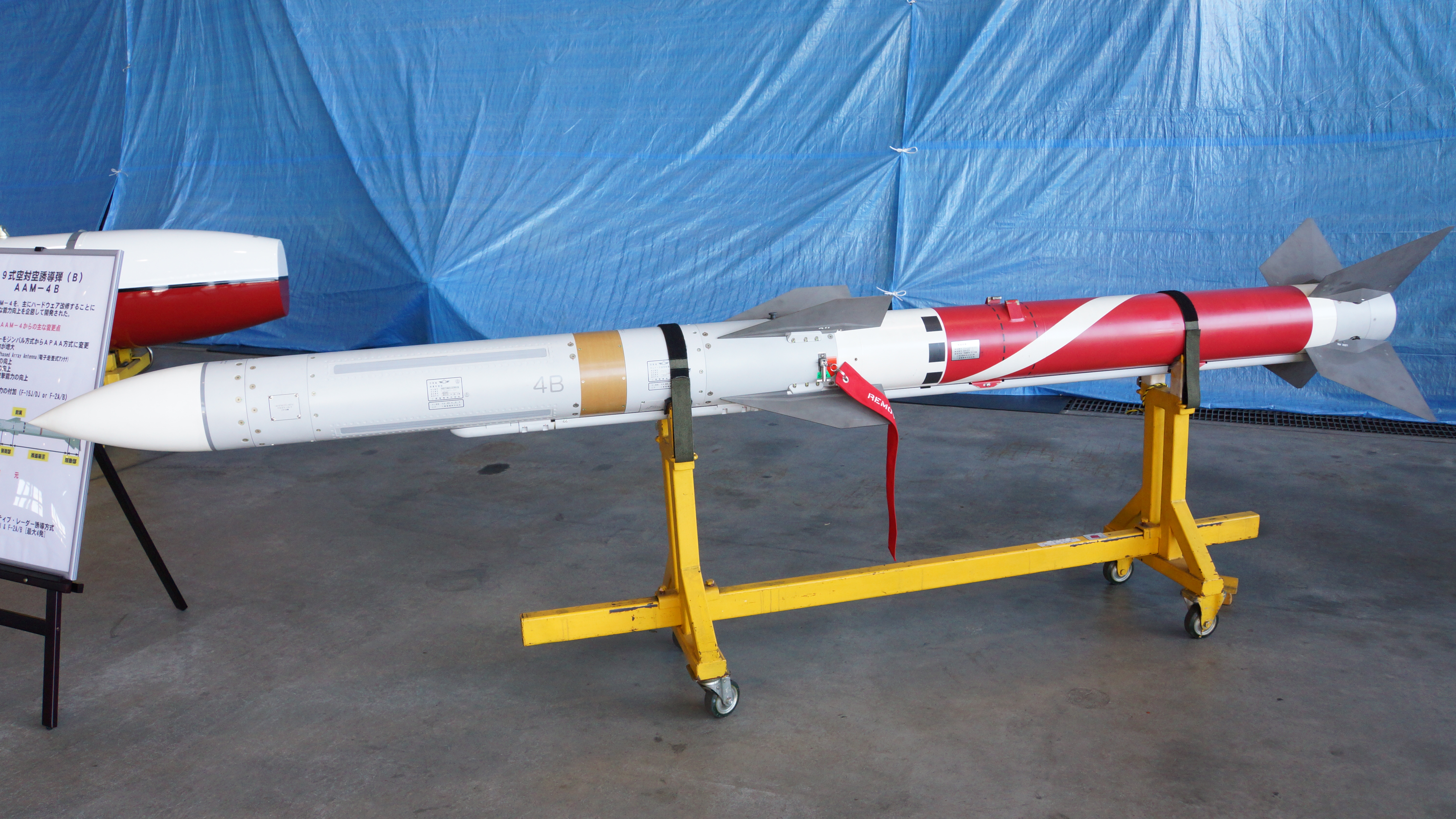 航空自衛隊 99式空対空誘導弾（改）（AAM-4B）。 15年10月25日 岐阜基地にて。